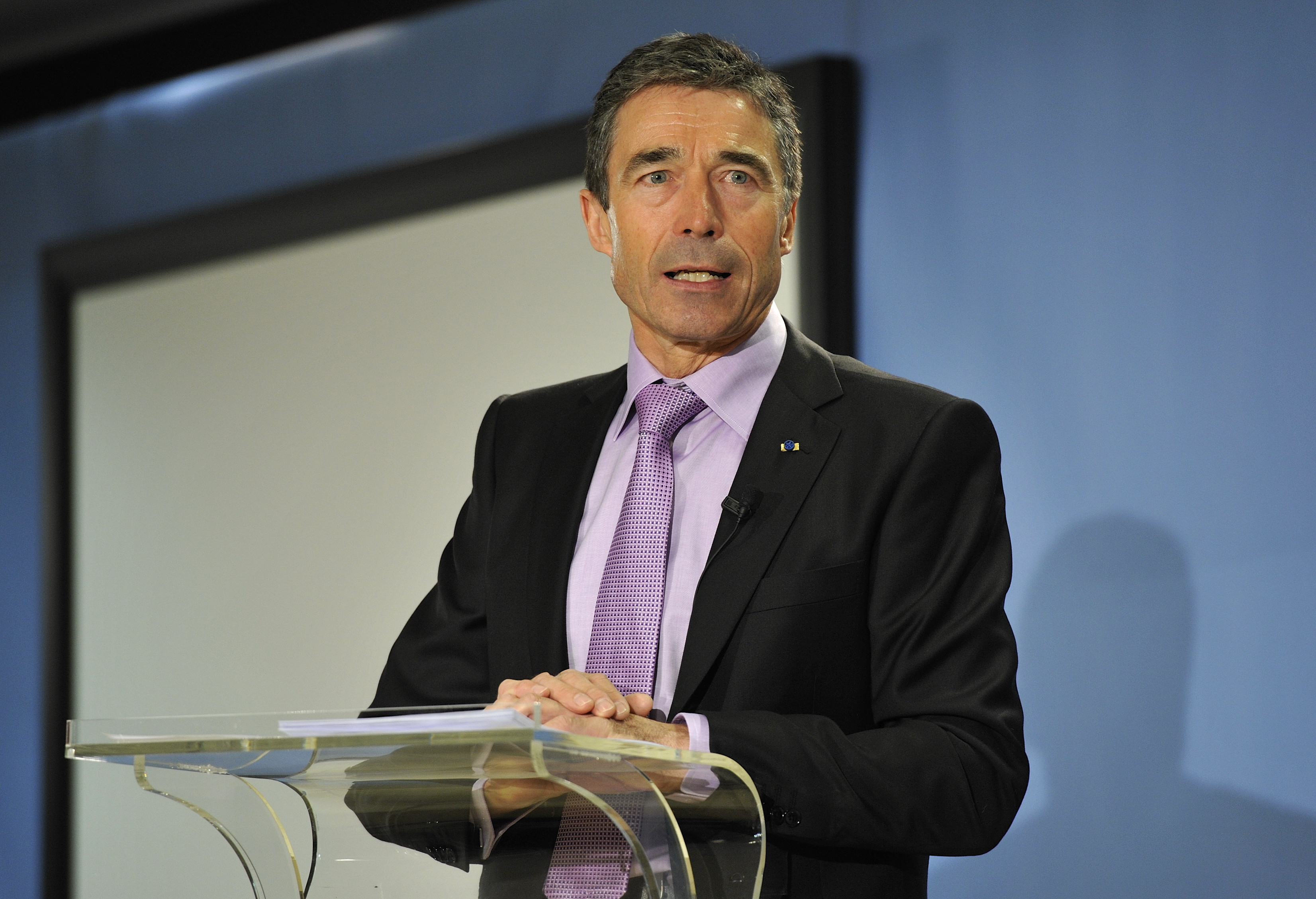 Anders Fogh Rasmussen